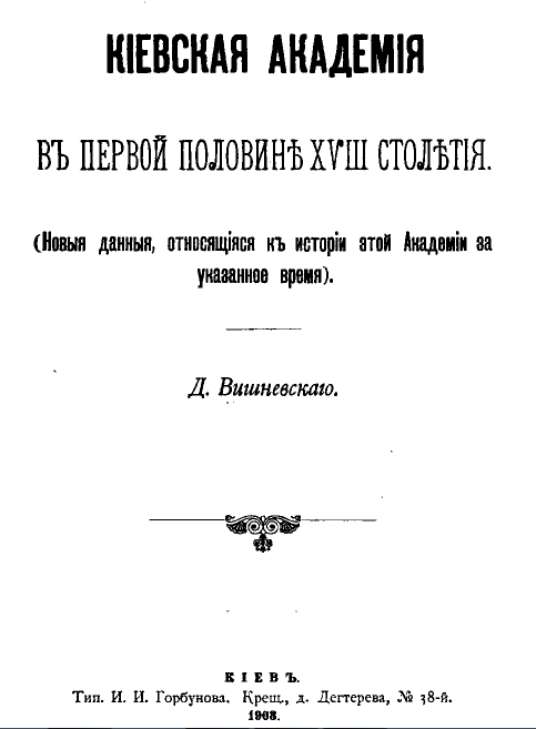 Сочинение Вишневского «Киевская академия в первой половине XVIII столетия»